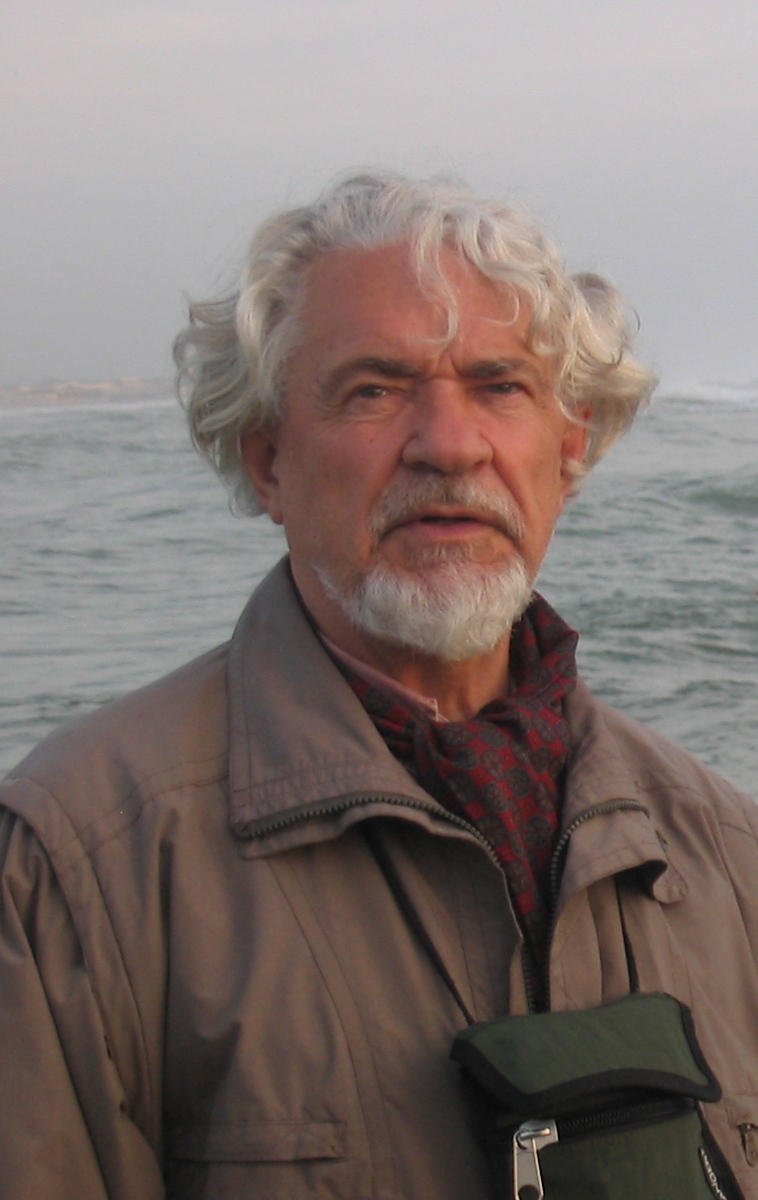 В.А. Шенталинский